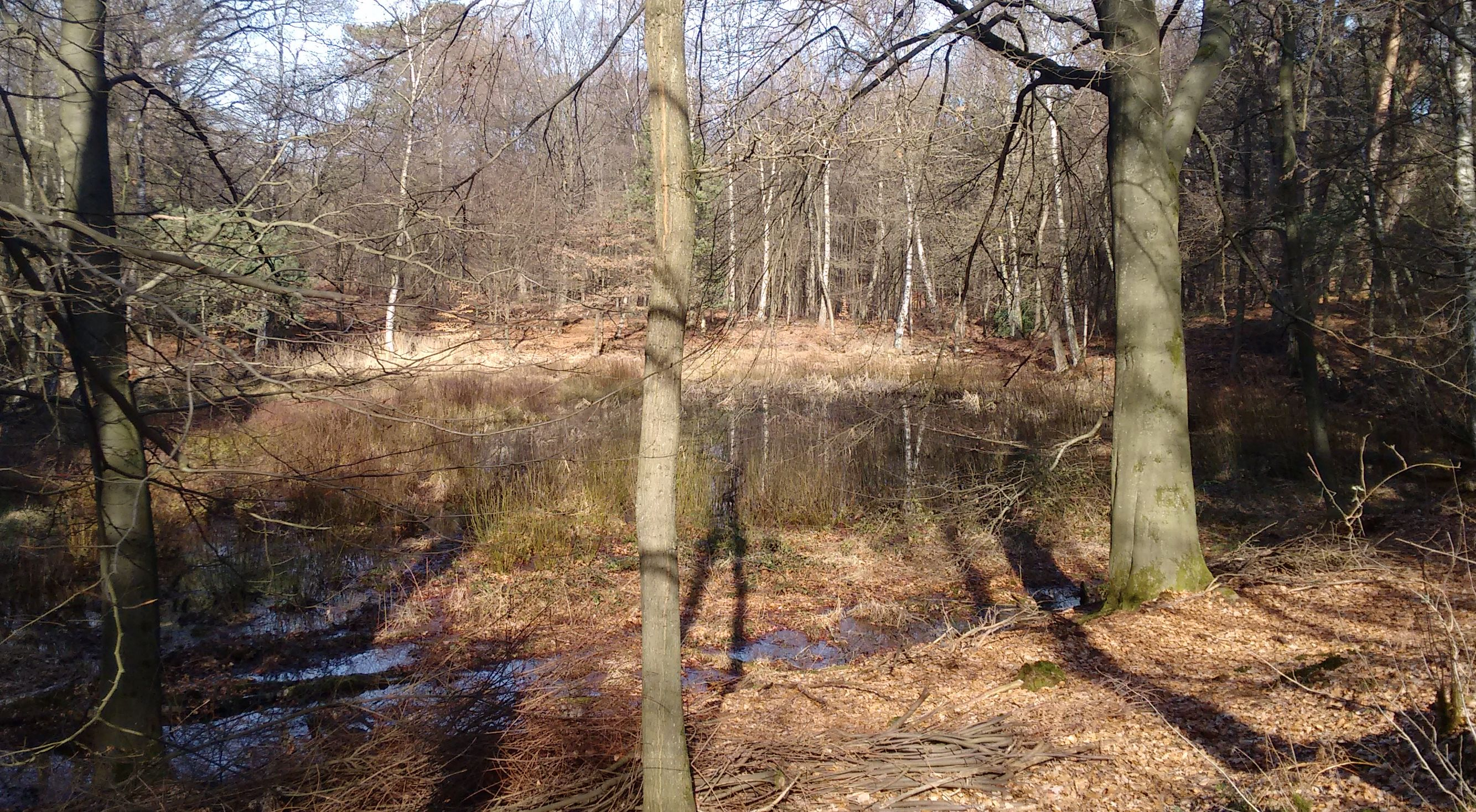 Der Kronenweiher ist ein Weiher in der Wahner Heide. Er ist natürlichen Ursprungs, als abgetorftes Moor aber stark durch den Menschen geprägt.